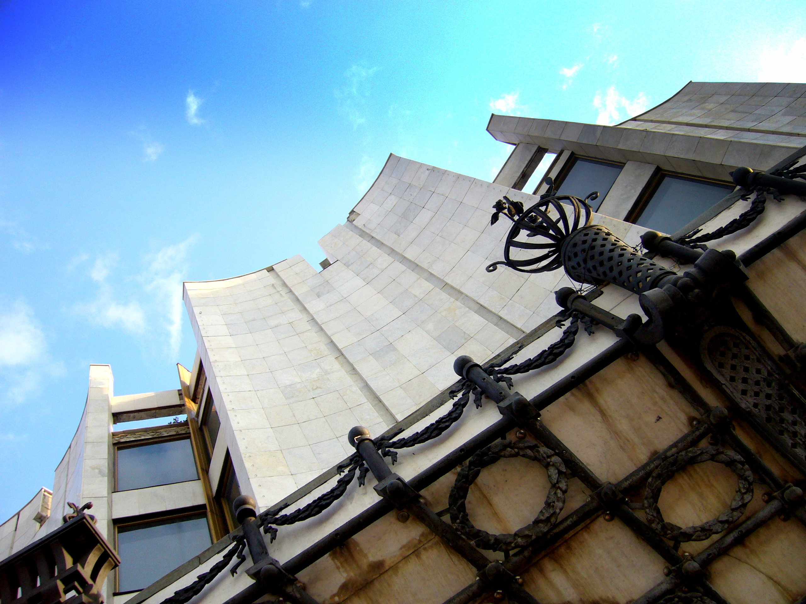 Театр драматический им. С.М. Цвиллинга (Челябинская область, Челябинск, площадь Революции, 6)